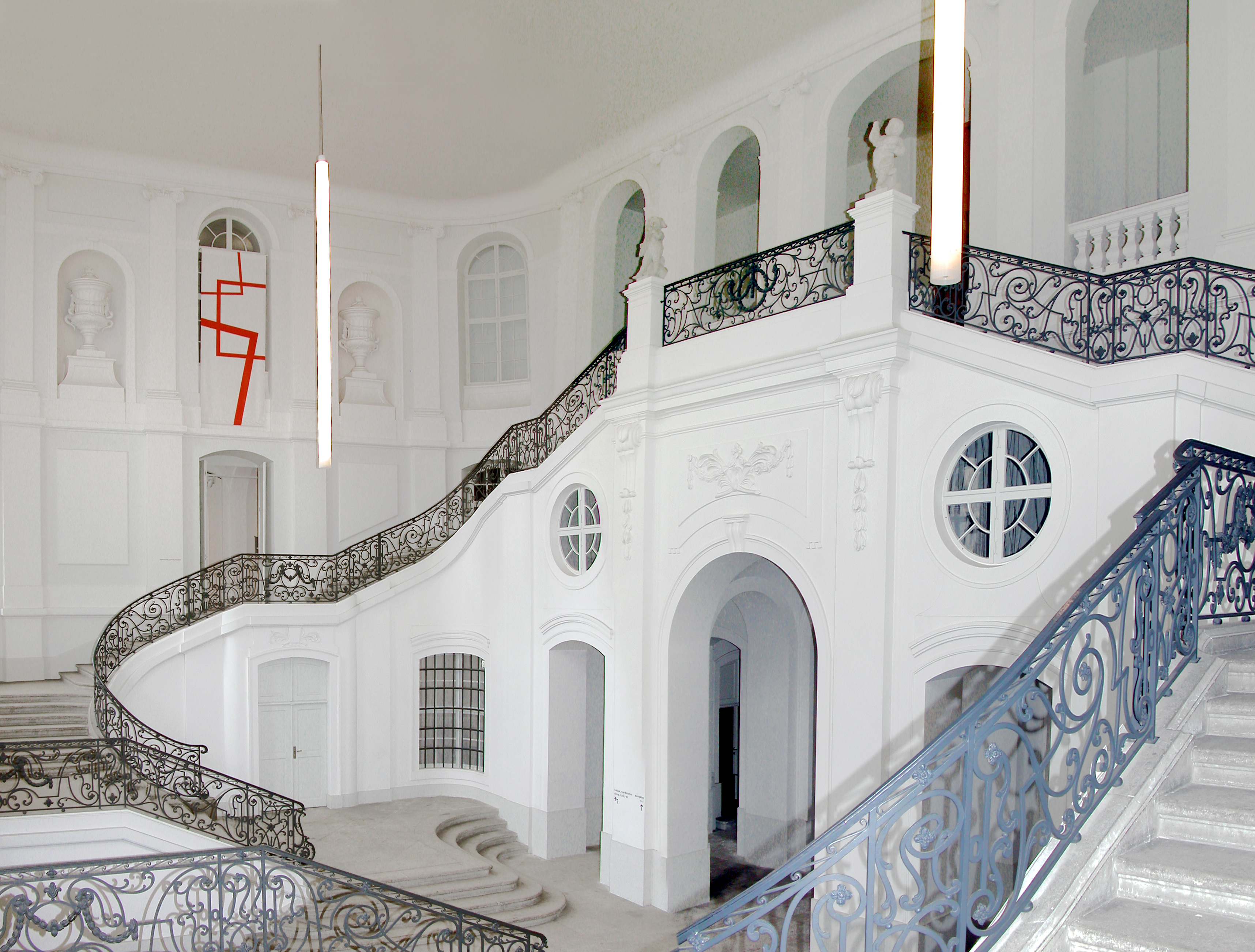 15.09.2009 Dresden-Altstadt, Wilsdruffer Straße: Treppenanlage im Alten Landhaus, frühklassizistisch (1770-1776 von F. A. Krubsacius). Heute Museum für Stadtgeschichte. [DSCN39017-39018]20090915100MDR.JPG(c)Blobelt